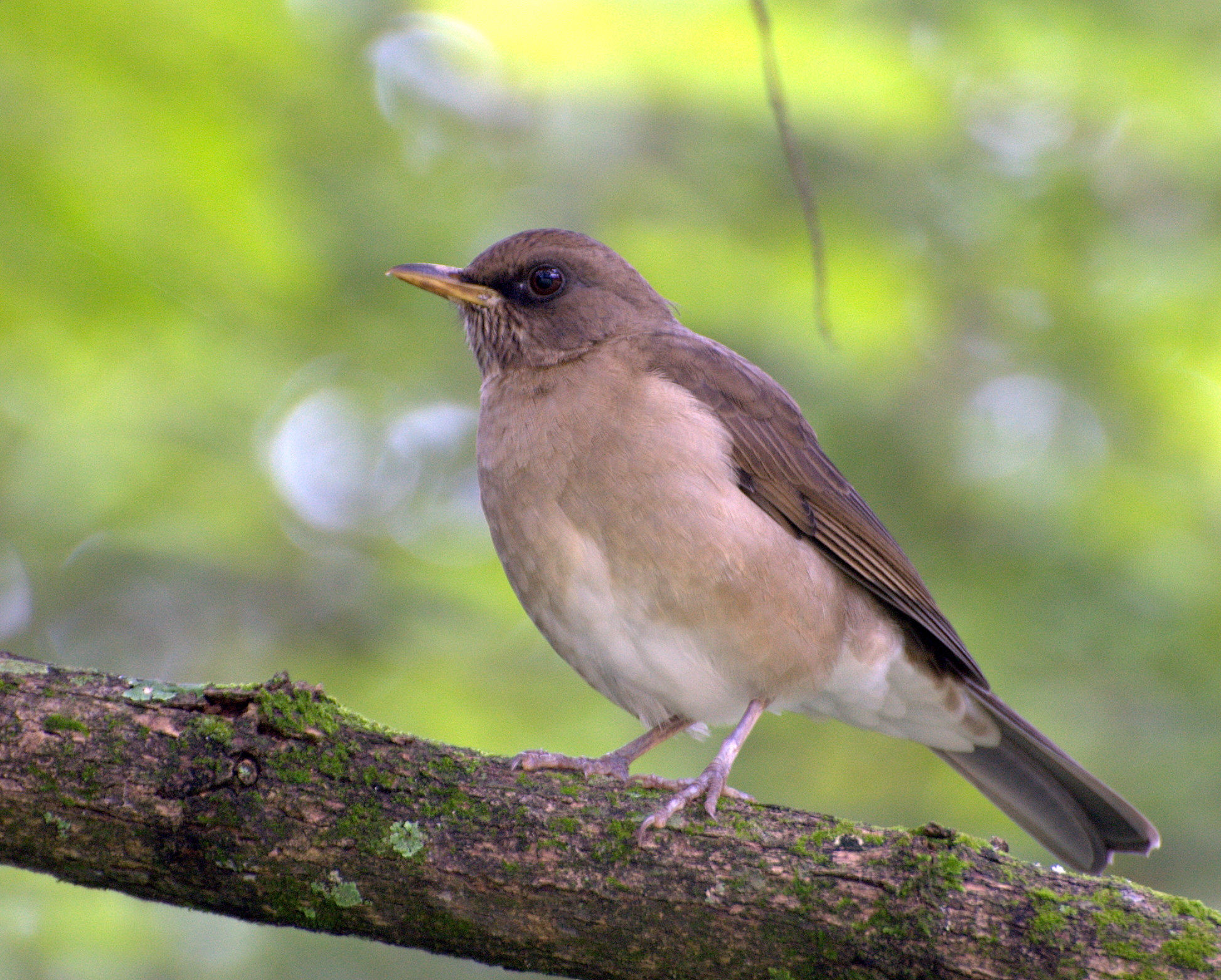 Horto Florestal de São Paulo